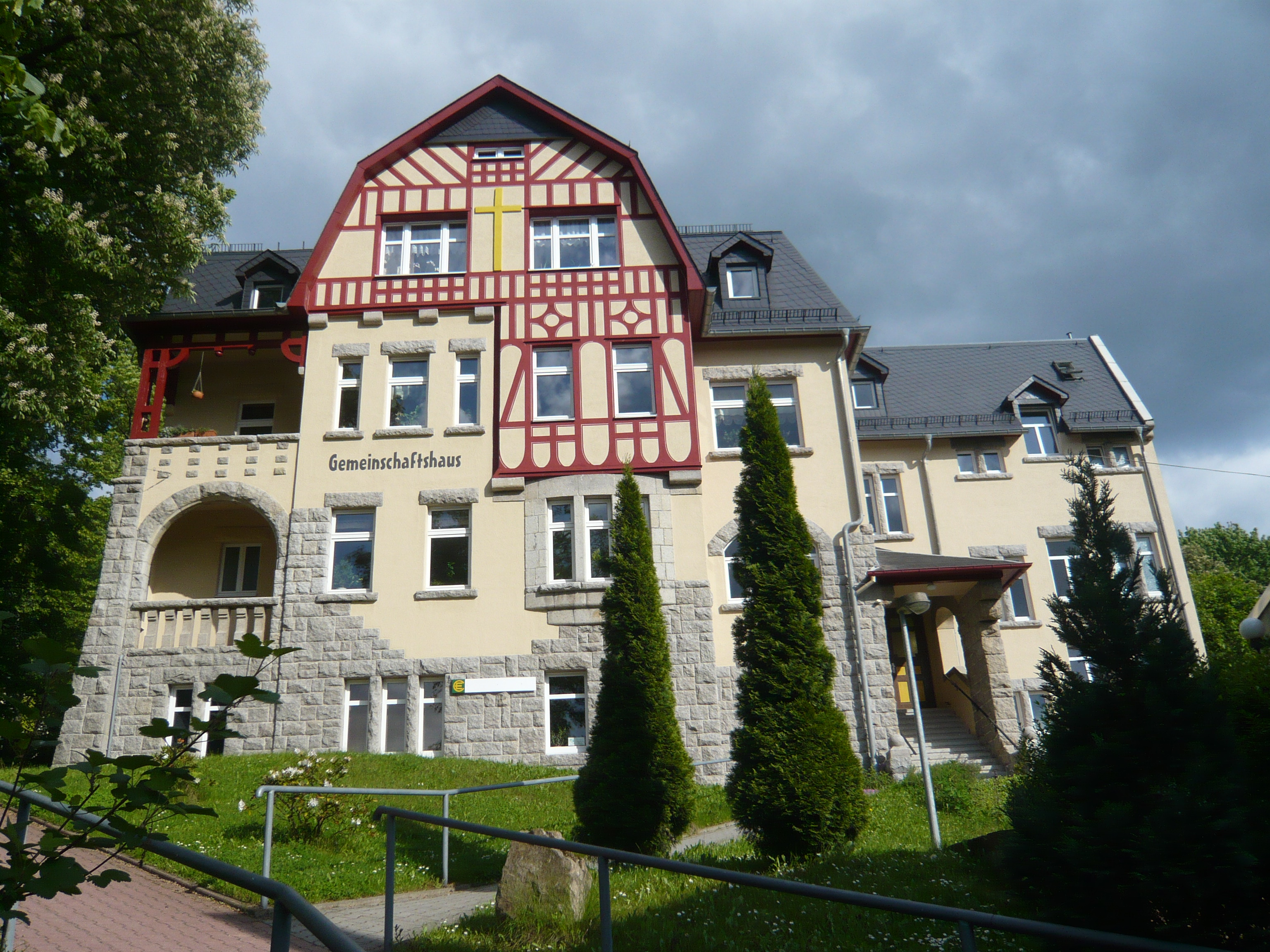 Stadt Aue, ev. Gemeinschaftshaus